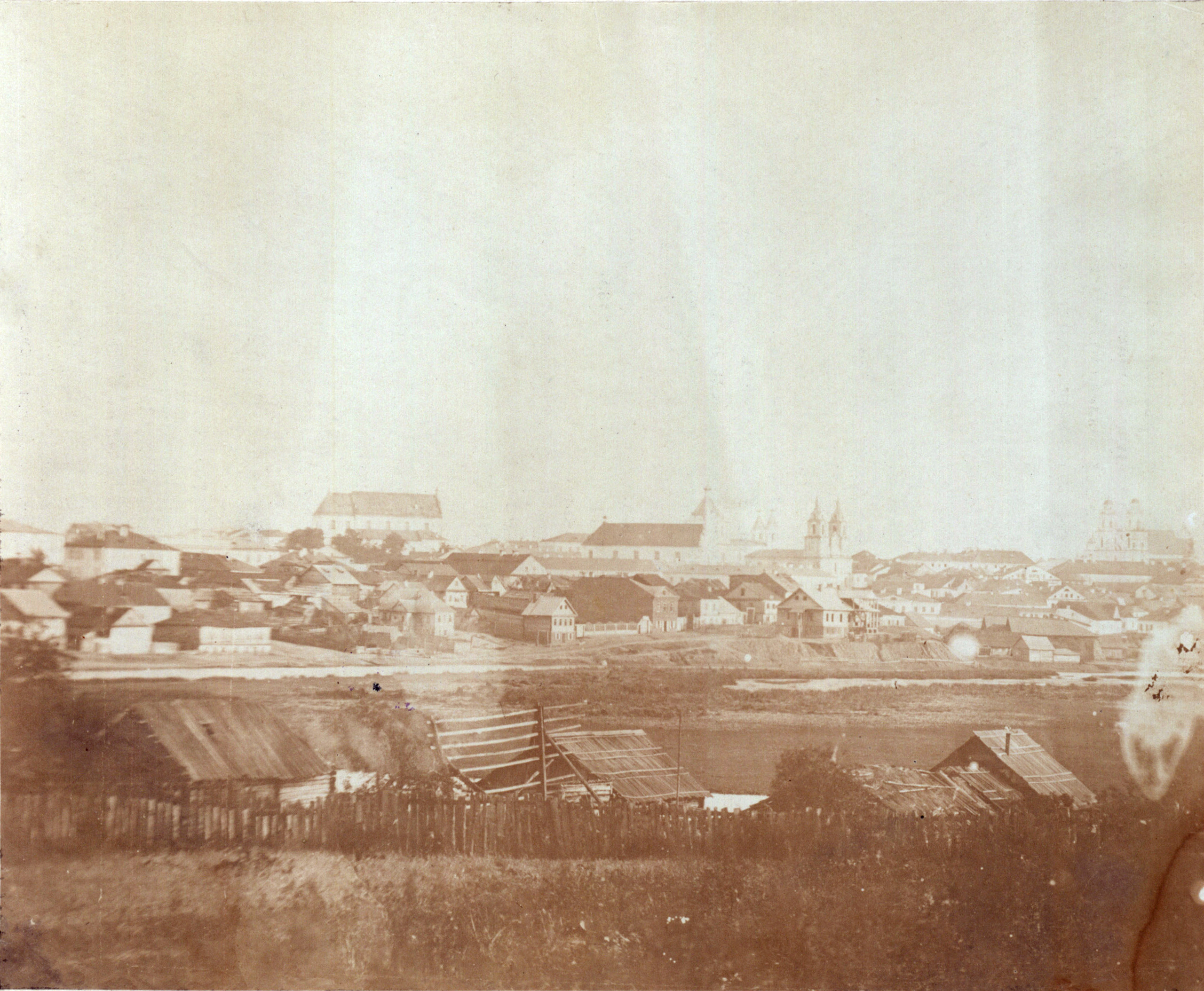 Беларуская (тарашкевіца): Менск (Miensk), Траецкаe прадмесьце (Trajeckaje pradmieściе)